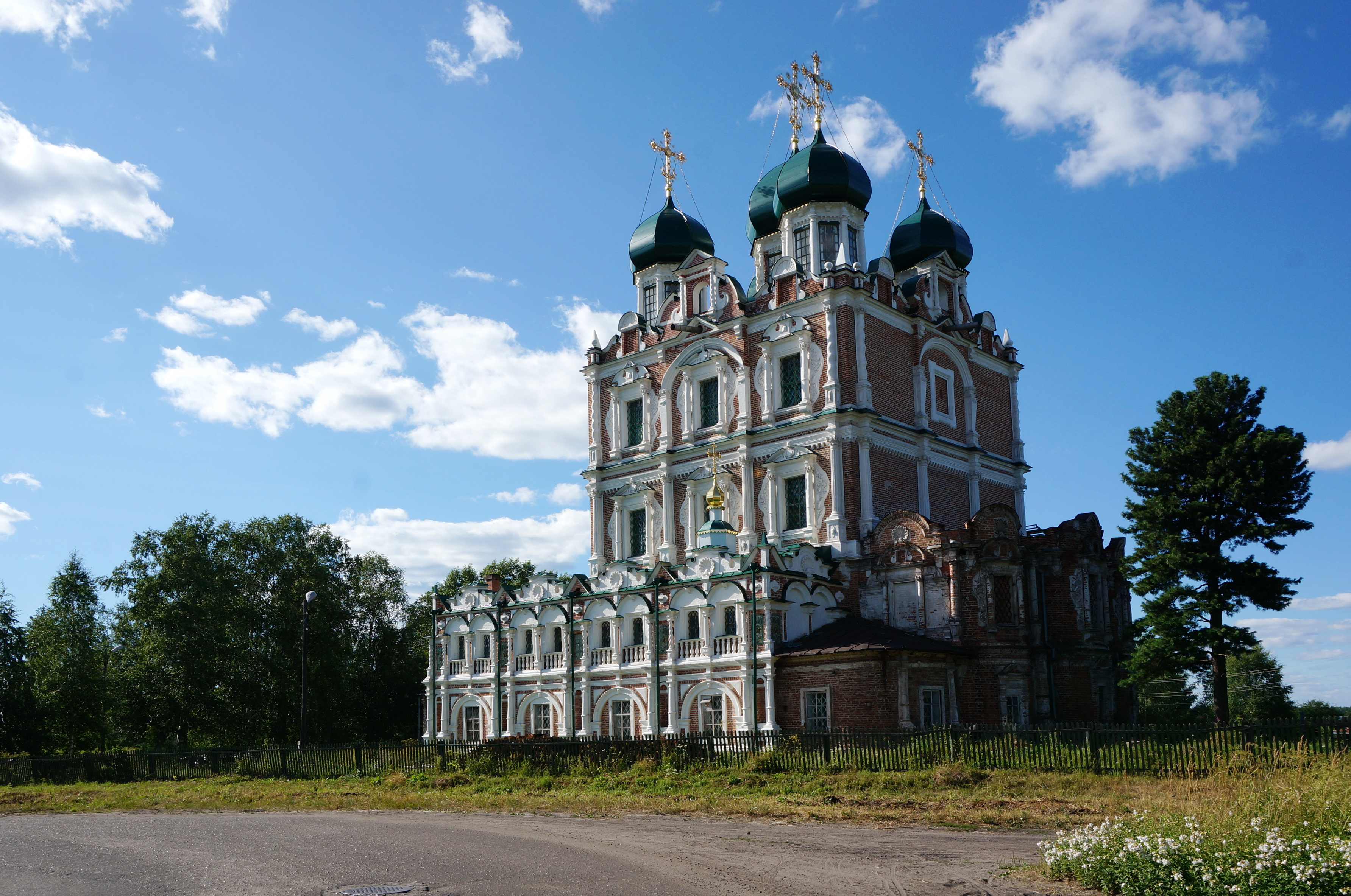 Собор Введенский (Архангельская область, Сольвычегодск, улица Володарского, 19, Курортная улица, Советская улица, 15)